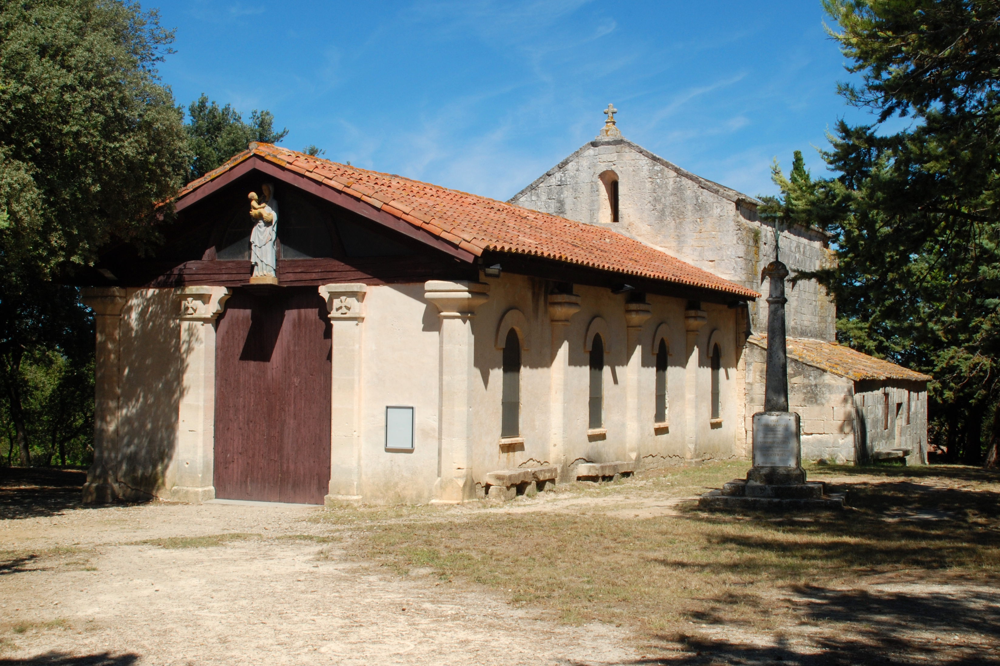 France - Hérault - Chapelle Notre-Dame-de-la-Pitié de Beaulieu